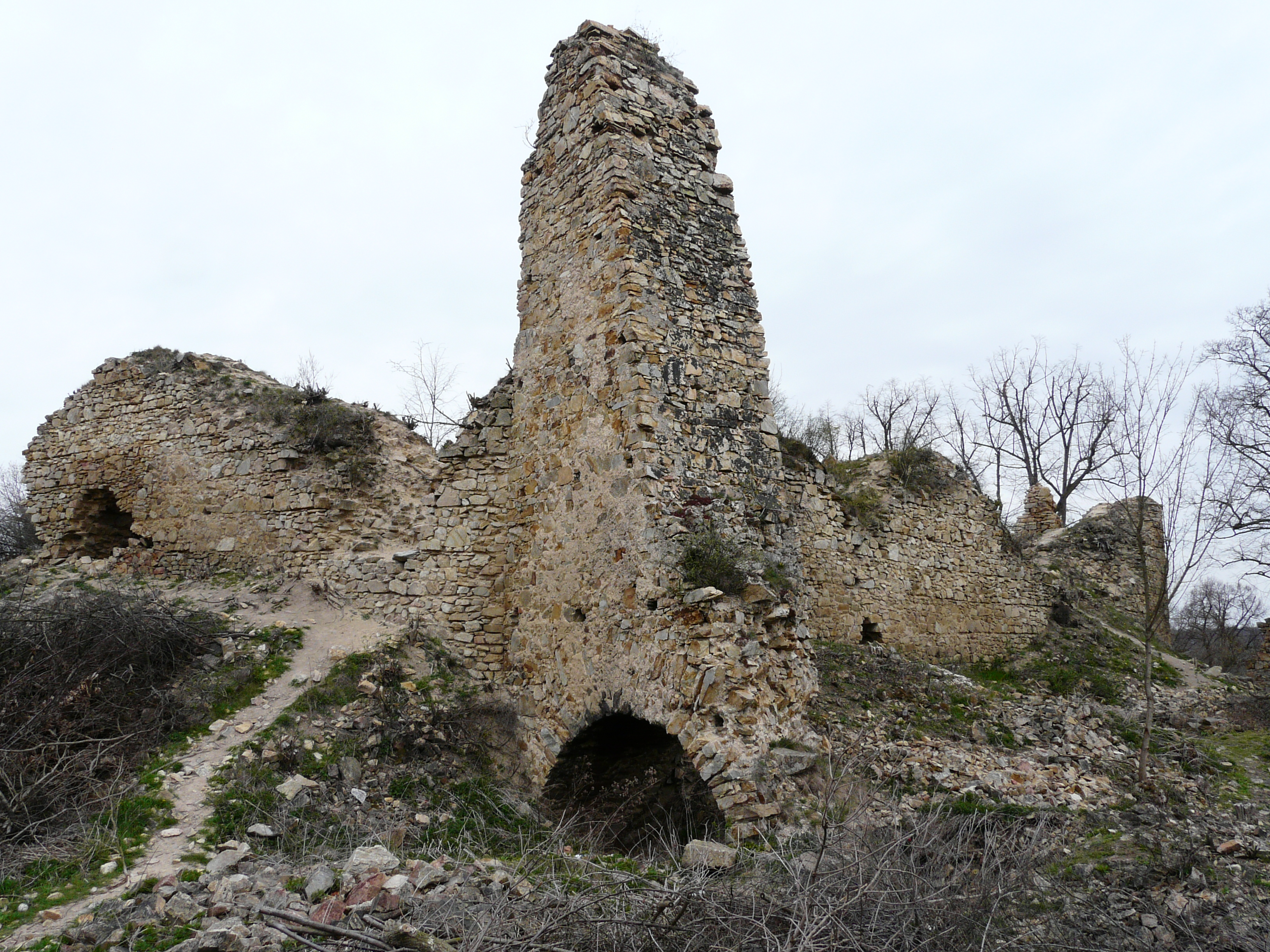 Valeč castle